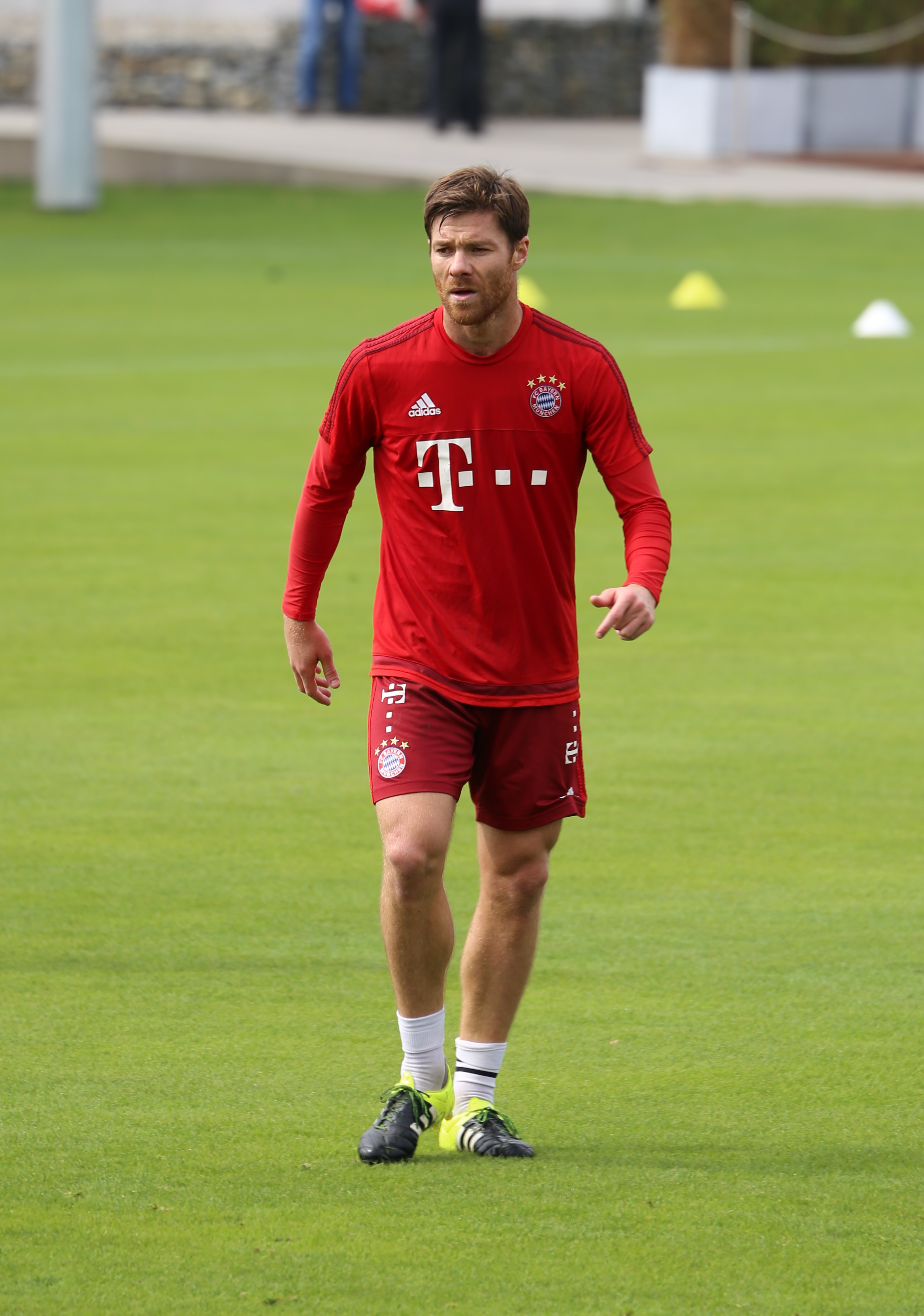 Xabi Alonso beim Training auf dem Gelände des FC Bayern München